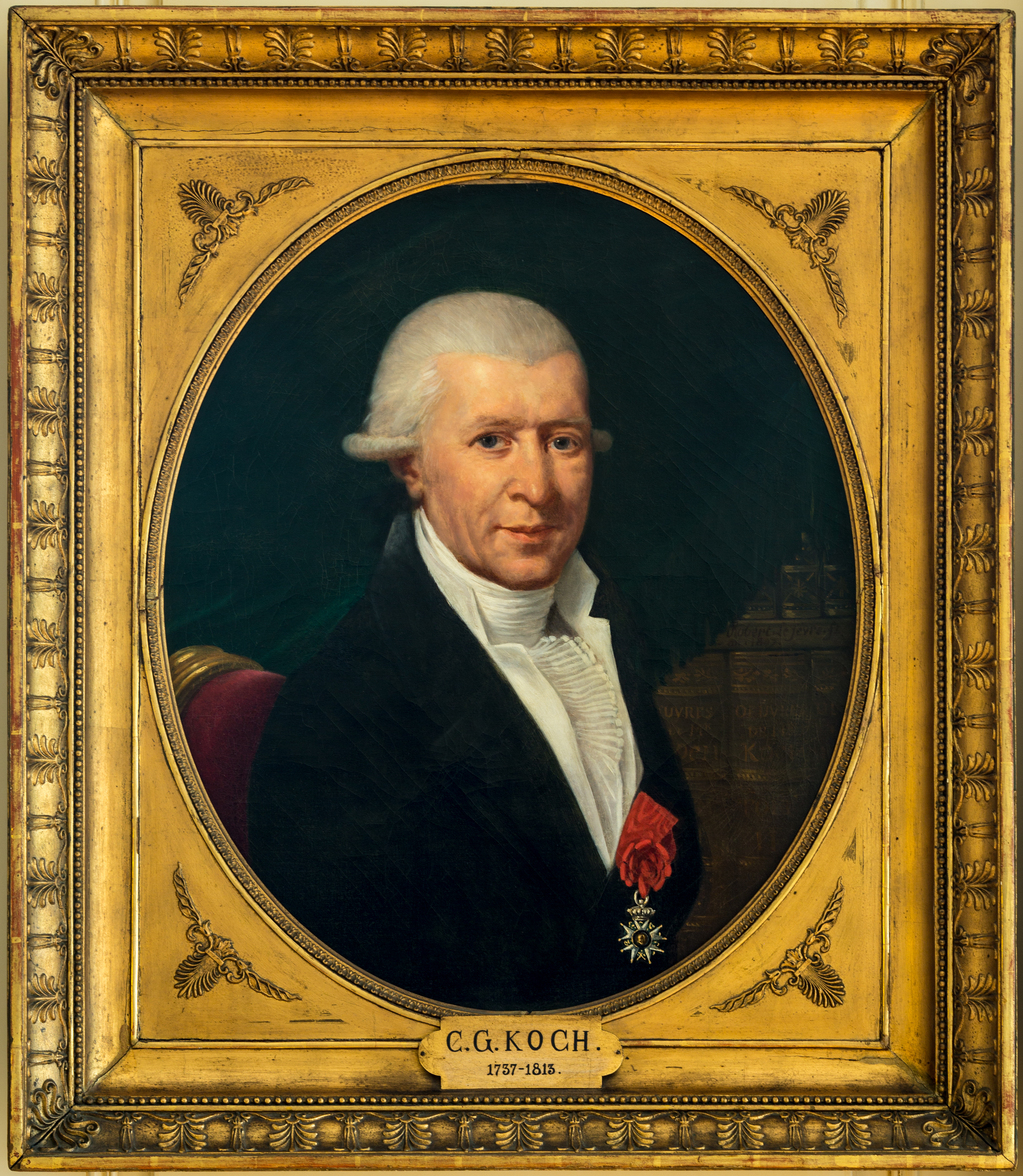 Portrait de Christophe Guillaume Koch (1737-1813), universitaire et homme politique alsacien. Peinture à l'huile sur toile. Collections du Chapitre de Saint-Thomas à Strasbourg, salle Koch